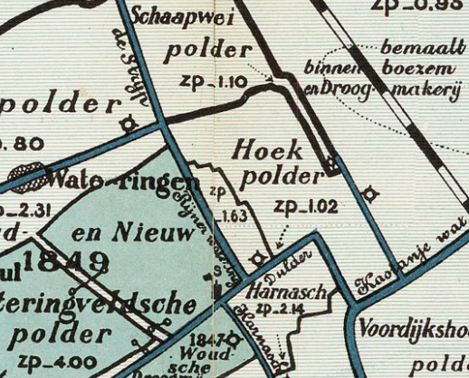 Hoekpolder